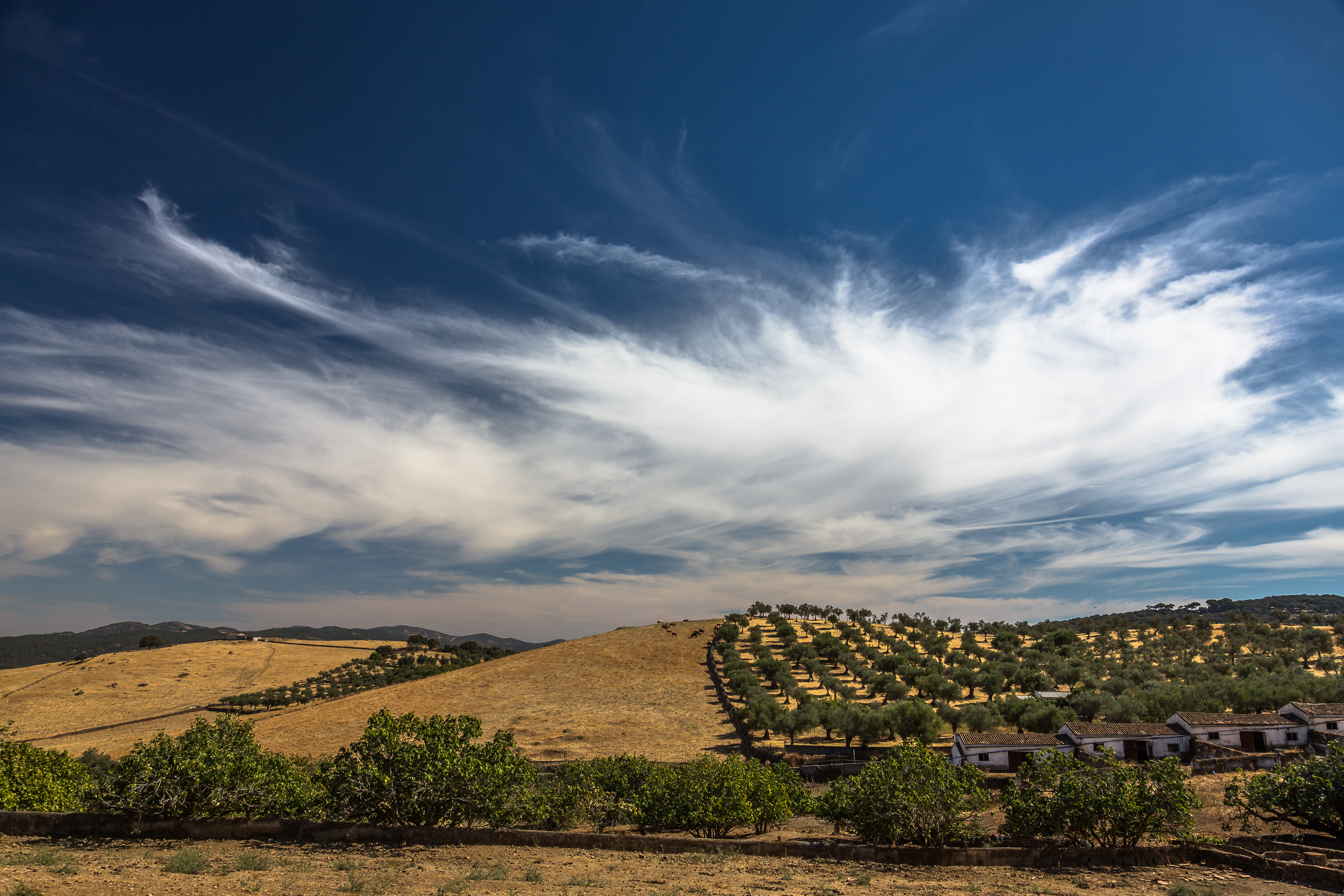 Fuentes de León | Badajoz